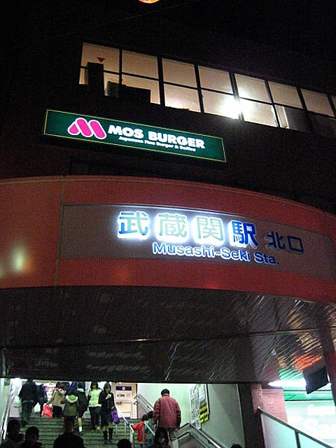 Musashiseki-station_night2006.jpg